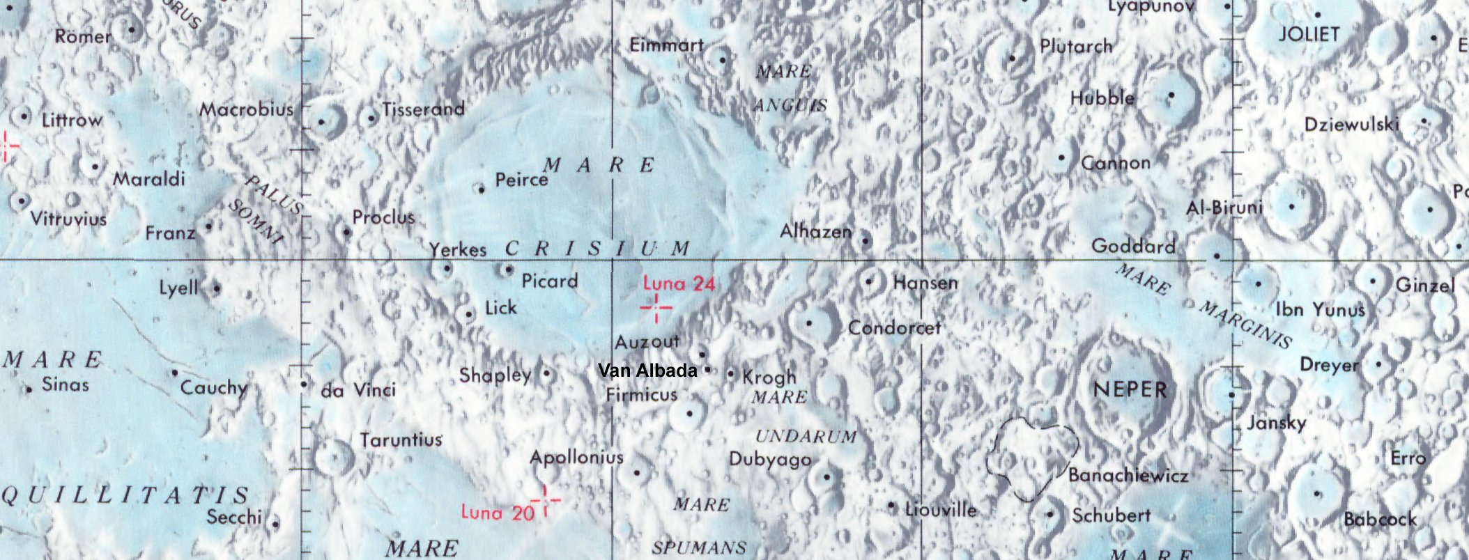 Cráter lunar van Albada. Localización. (Imagen LRO)